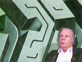 Portrait de Peter Stämpfli